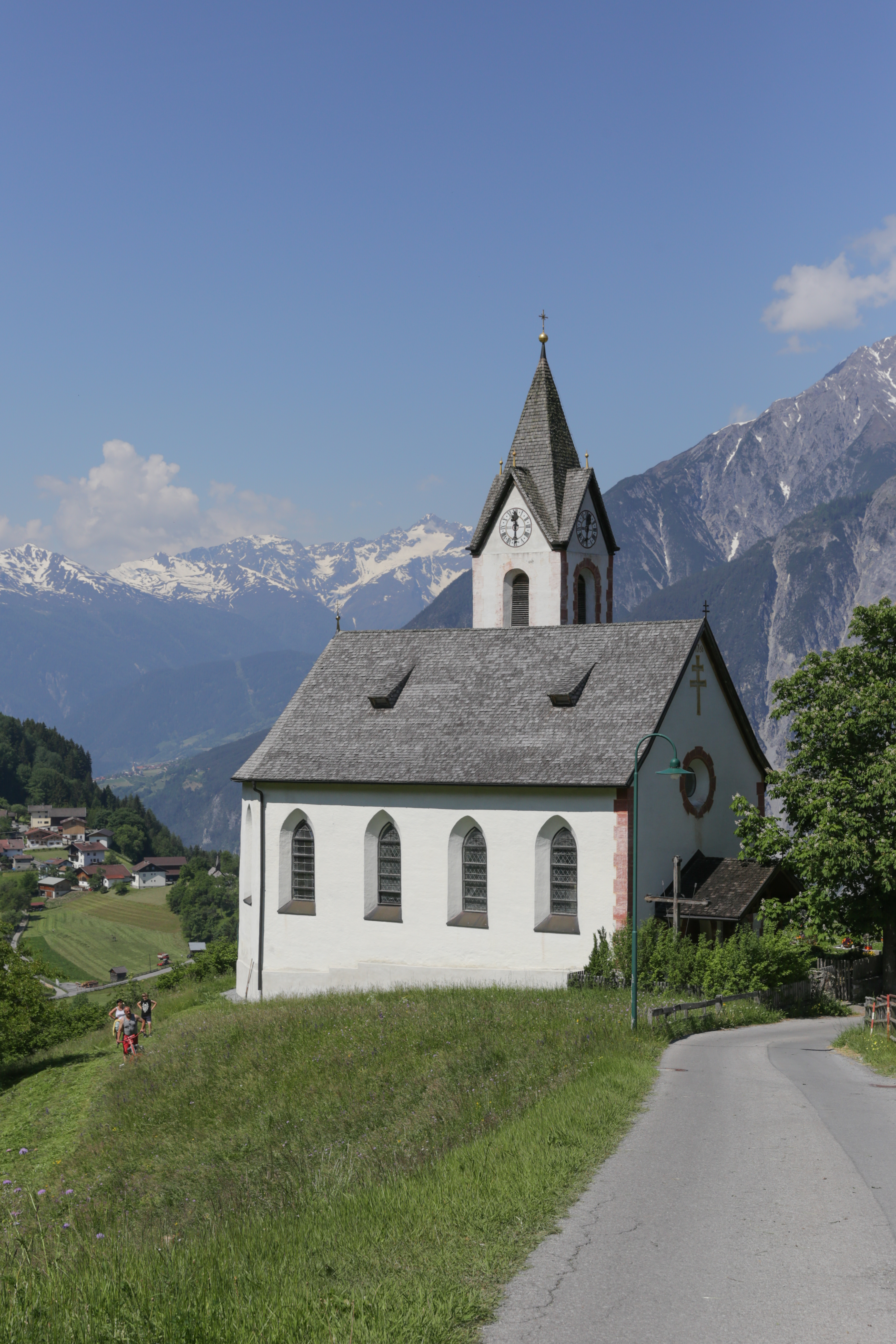 AT 65034 Expositurkirche Mariä Reinigung (Falterschein), Zams, Tirol